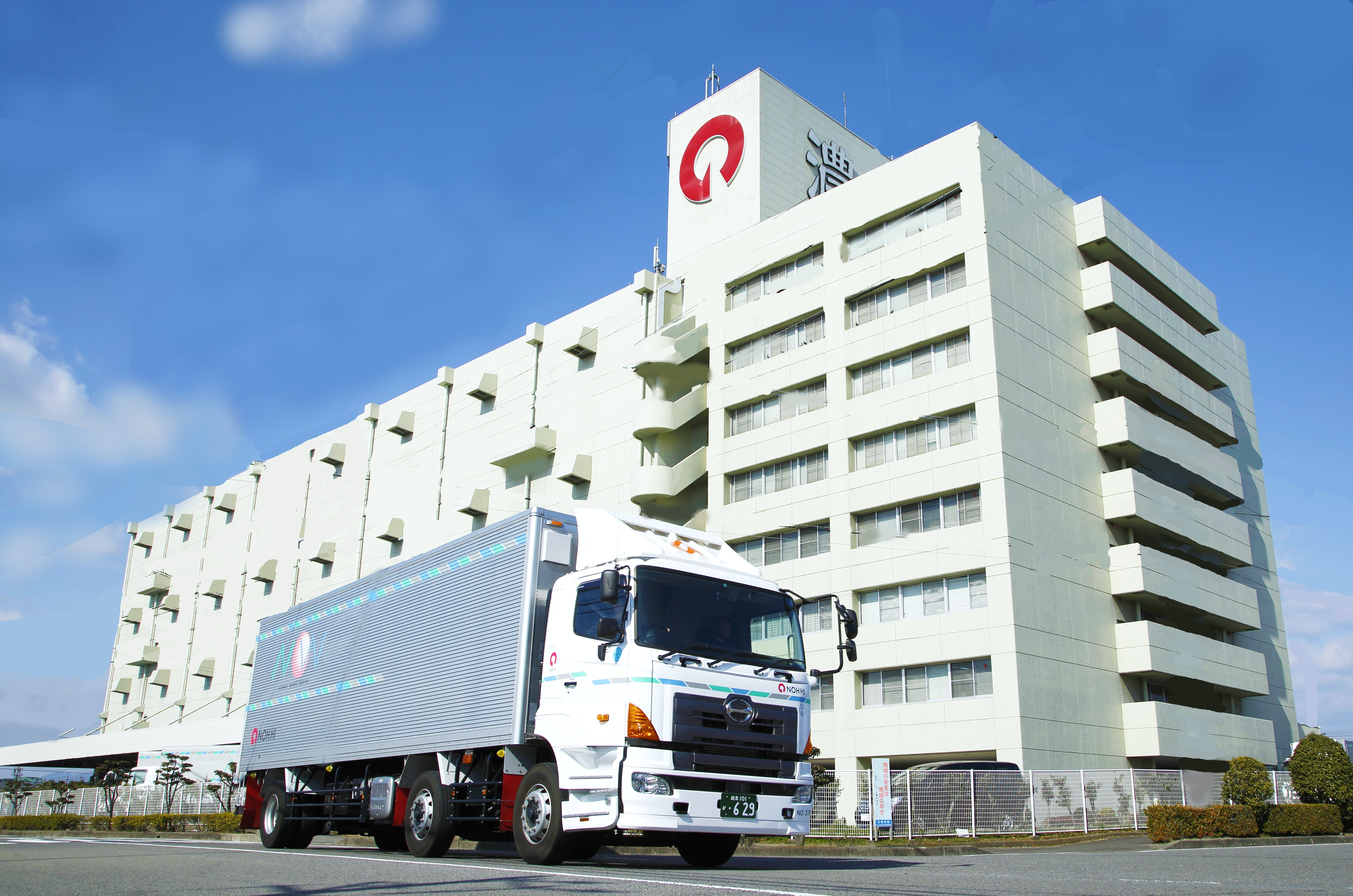 濃飛倉庫運輸の岐阜支店とトラック